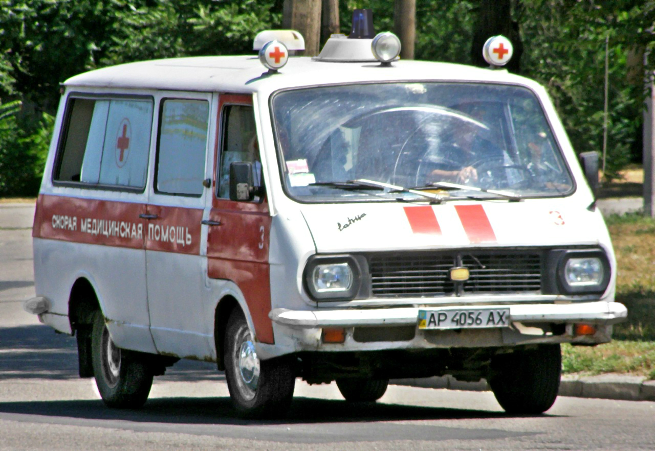 Скорая Медицинская Помощь